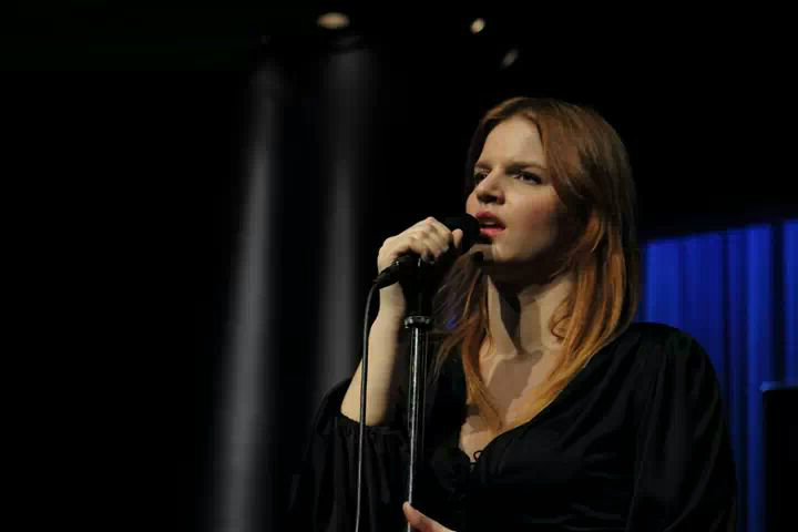 Chiara in concerto a Milano il 20 luglio 2013